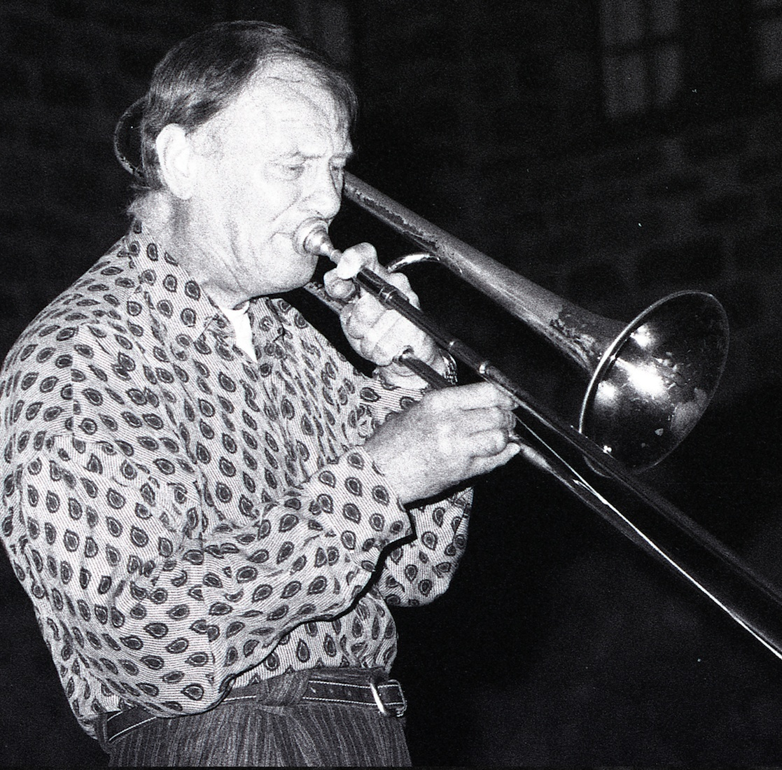 Albert Mangelsdorff, Konzert in Magdeburg 10.07.1992, Klosterinnenhof